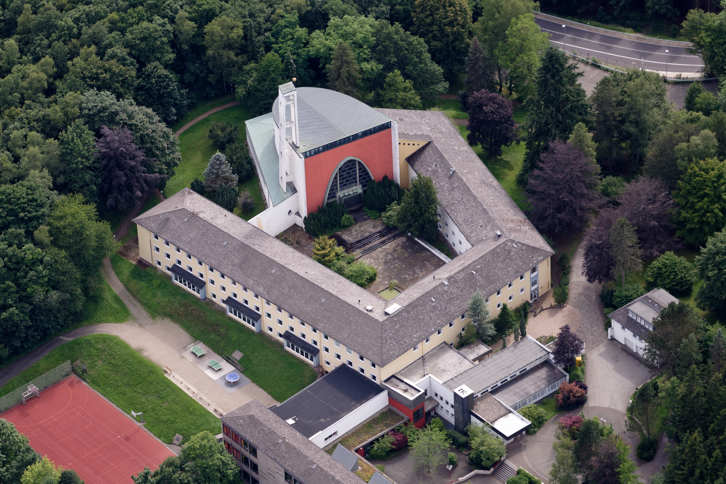 Fotoflug Sauerland West. Luftaufnahme: Kloster und Gymnasium Maria Königin, Altenhundem, Nordrhein-Westfalen.